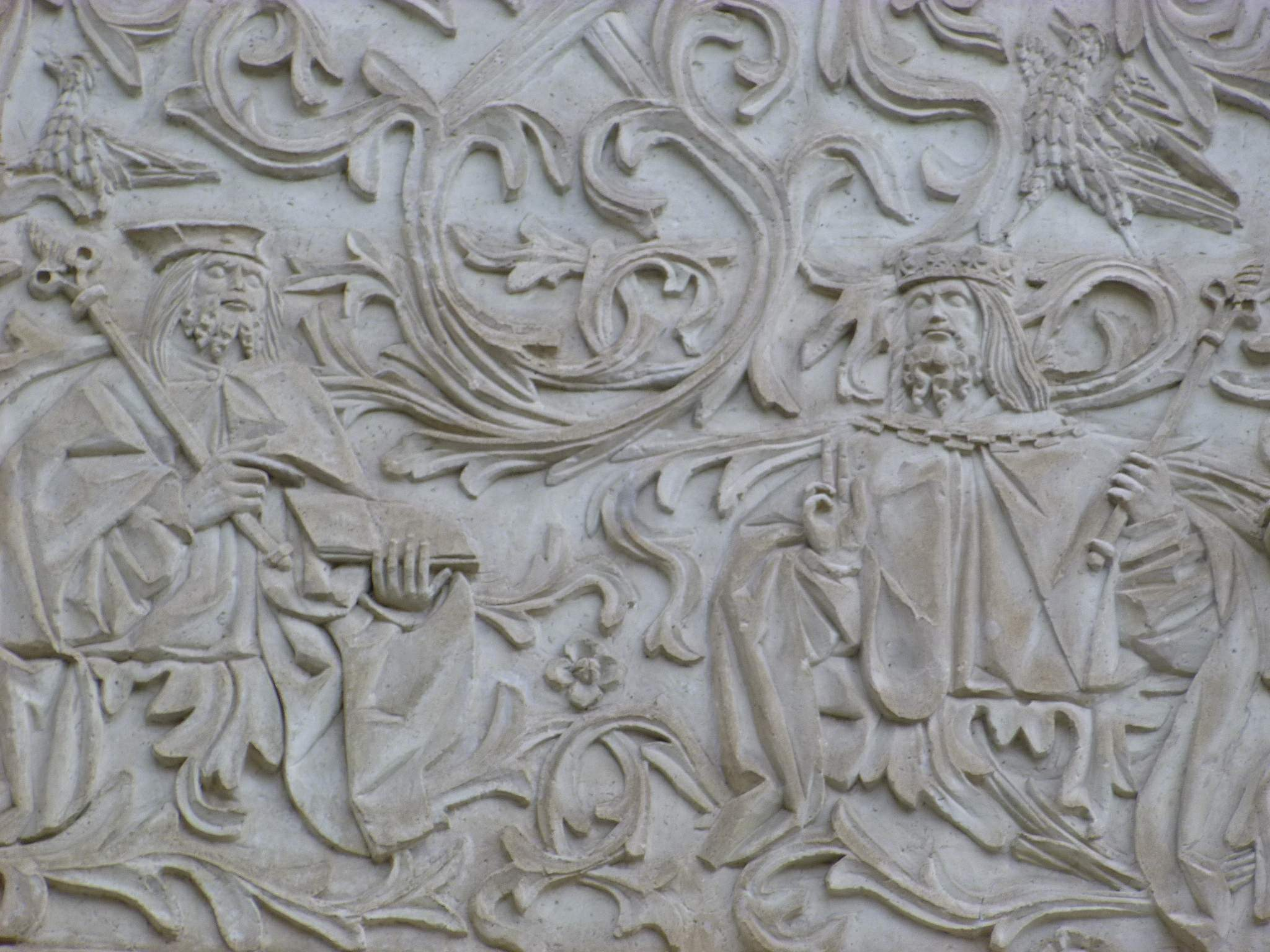 Jauregi etxea (Bergara, Gipuzkoa)